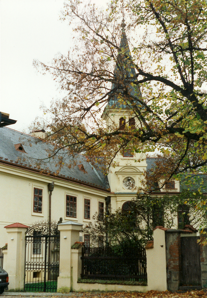 Castle Lužany, Plzeňský kraj, Czech Republic